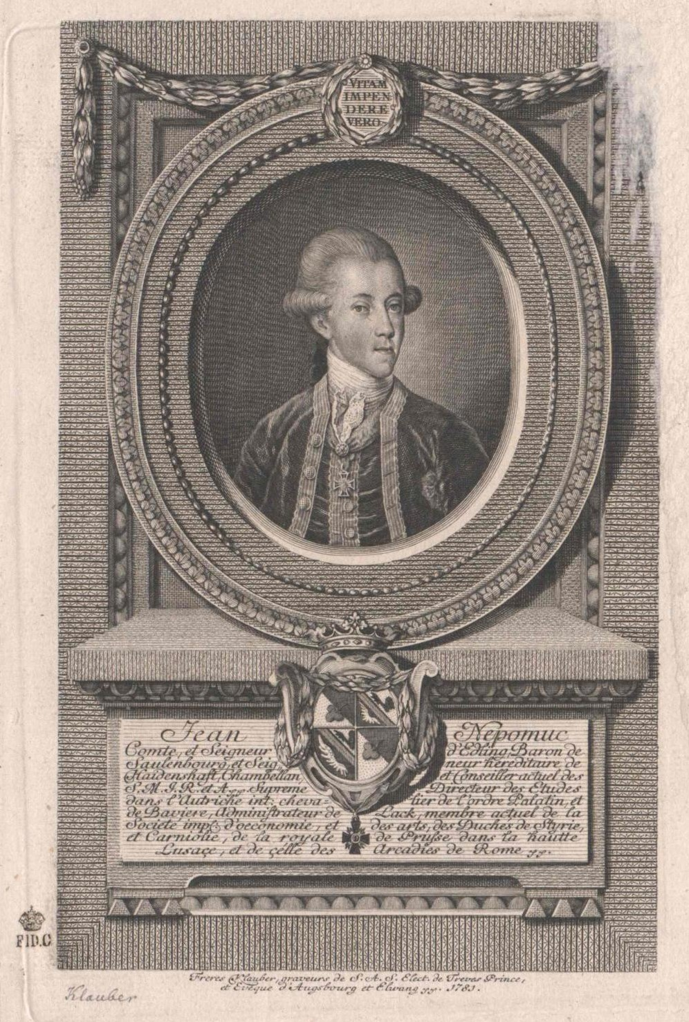 Johann Nepomuk Graf von Edling (1747-1793), Kupferstich der Brüder Klauber von 1781, Porträtsammlung der Österreichischen Nationalbibliothek